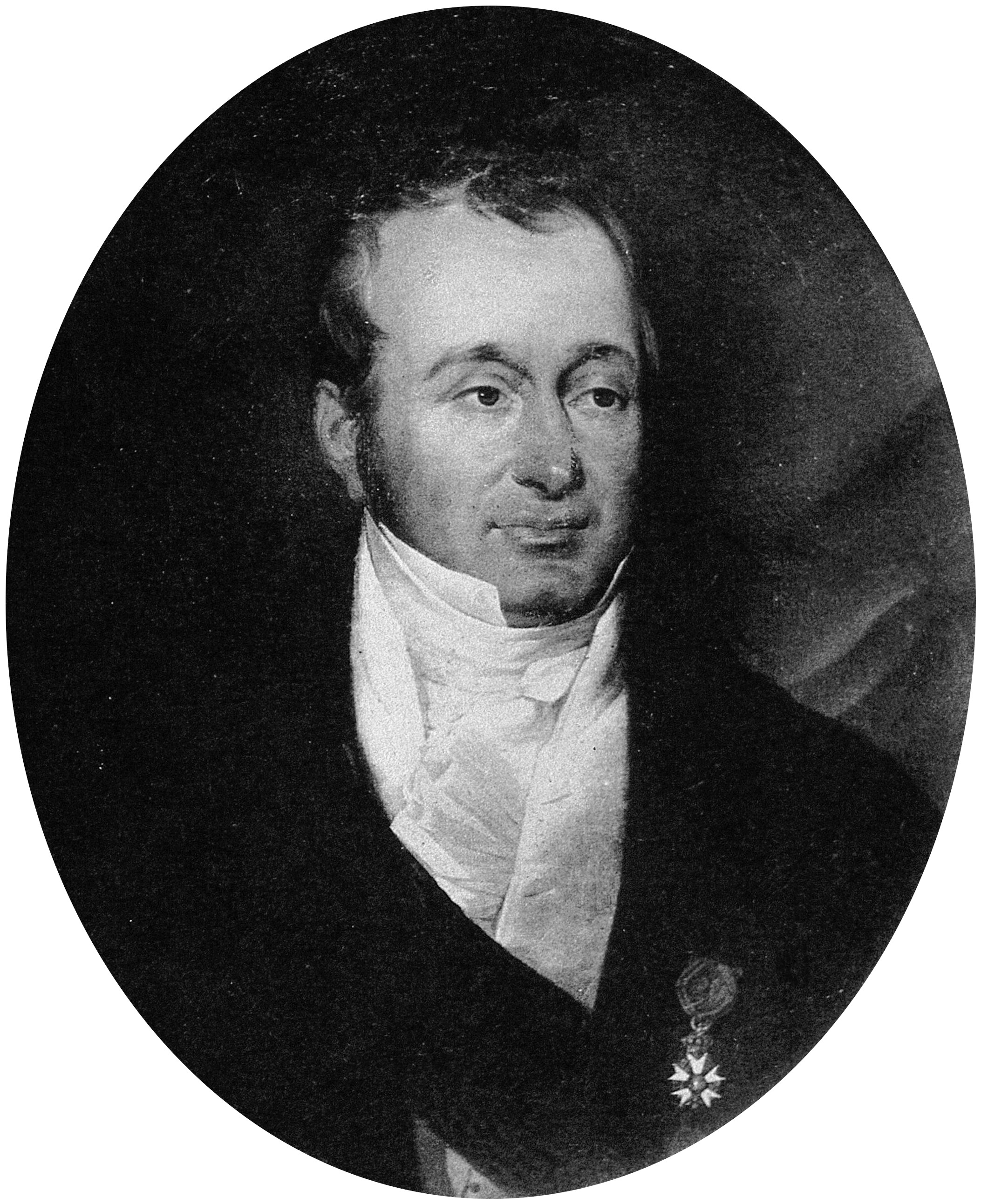 Guillaume Dupuytren photogravure